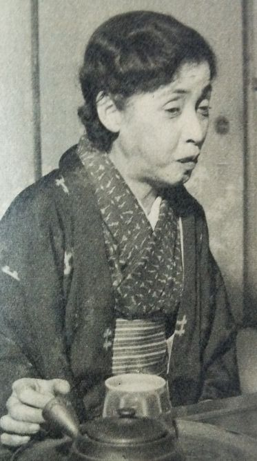 船田文子（消費者運動家。船田享二の妻）